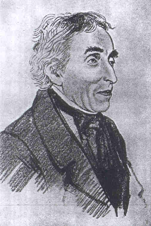 Der tschechischer Theologe, Philologe und Slawist Josef Dobrovský (1753-1829)